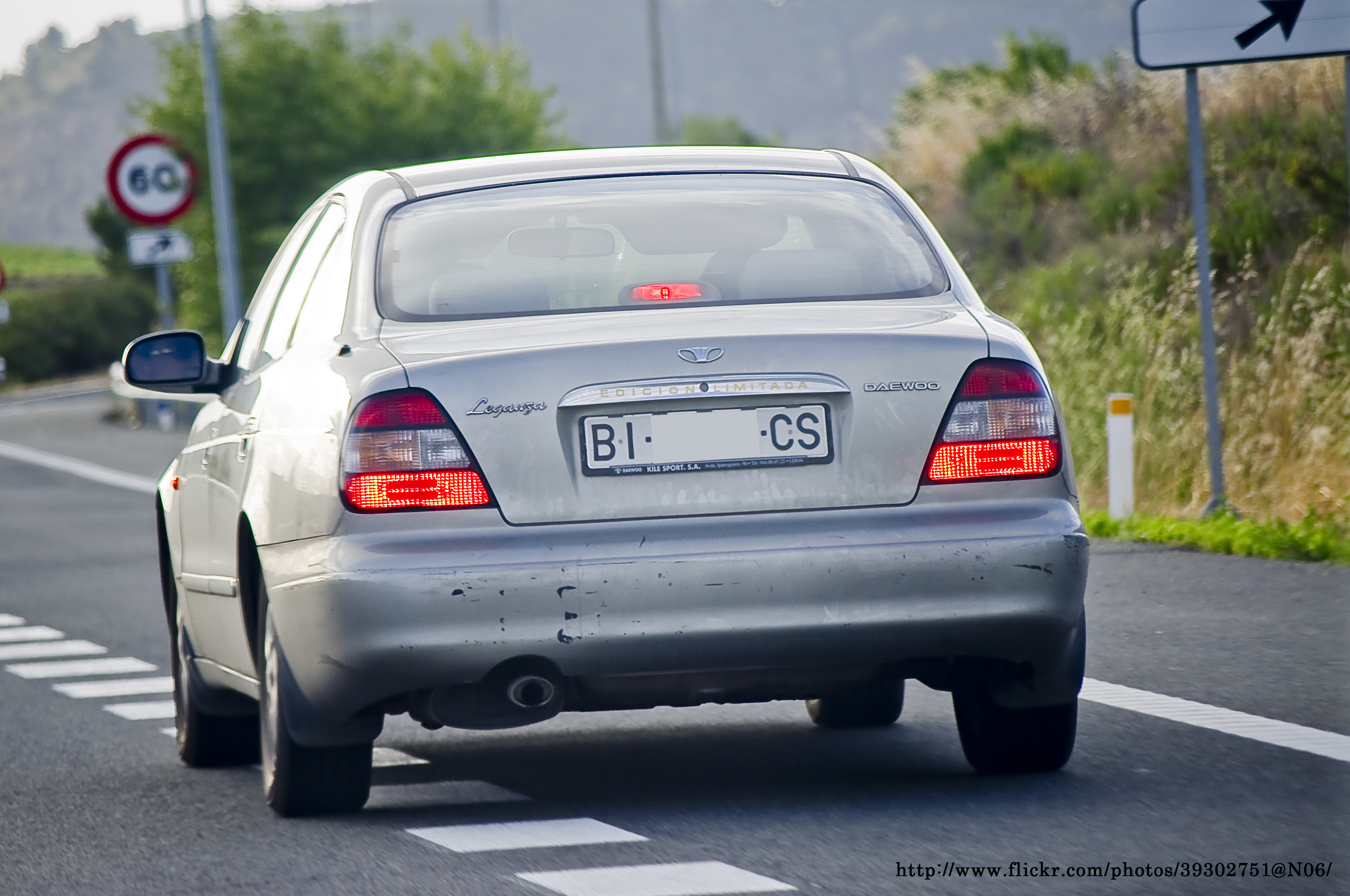 1999 Daewoo Leganza edición limitada